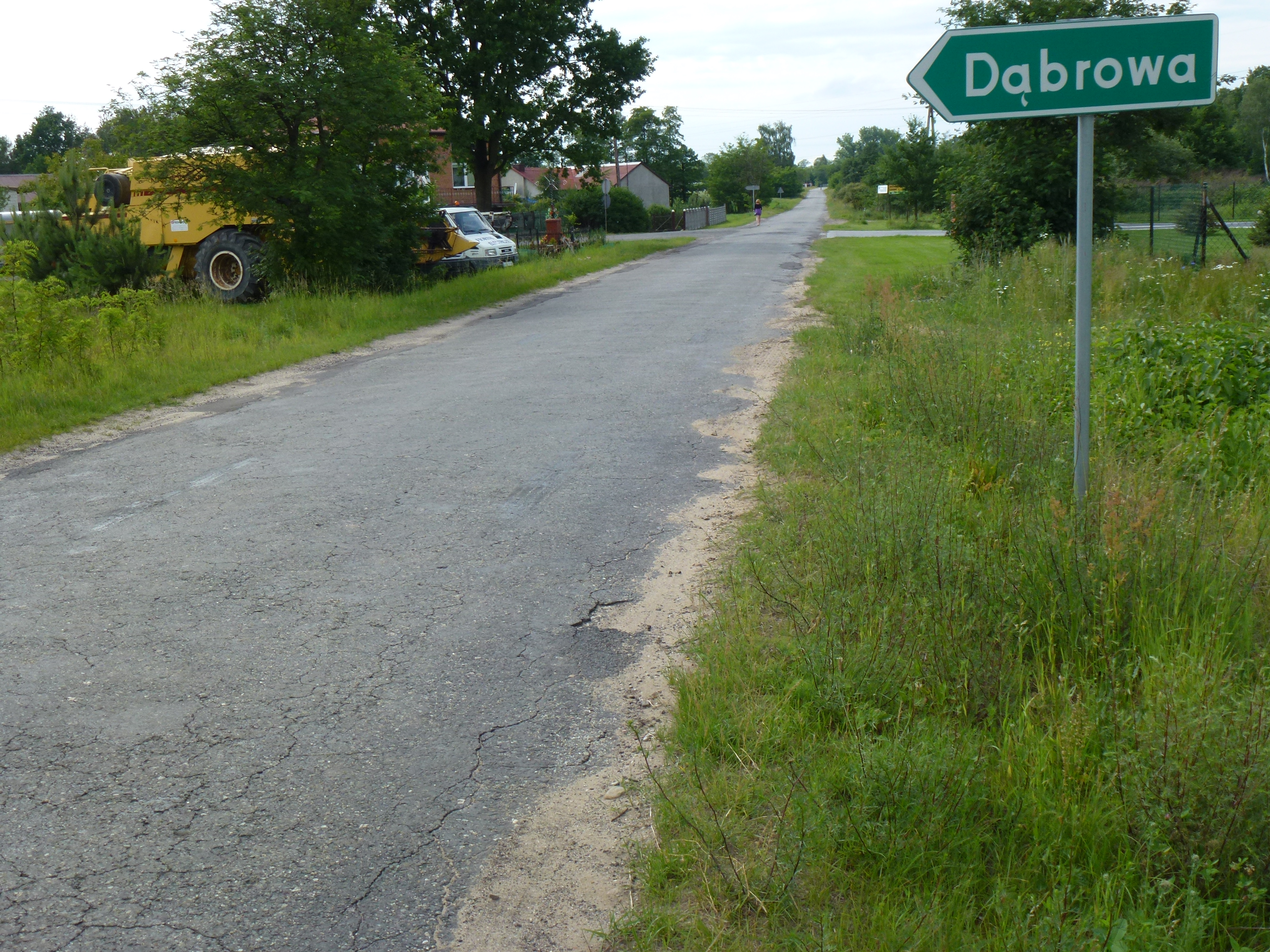 Dąbrowa -wieś w Polsce, w województwie łódzkim, powiecie bełchatowskim, gminie Zelów